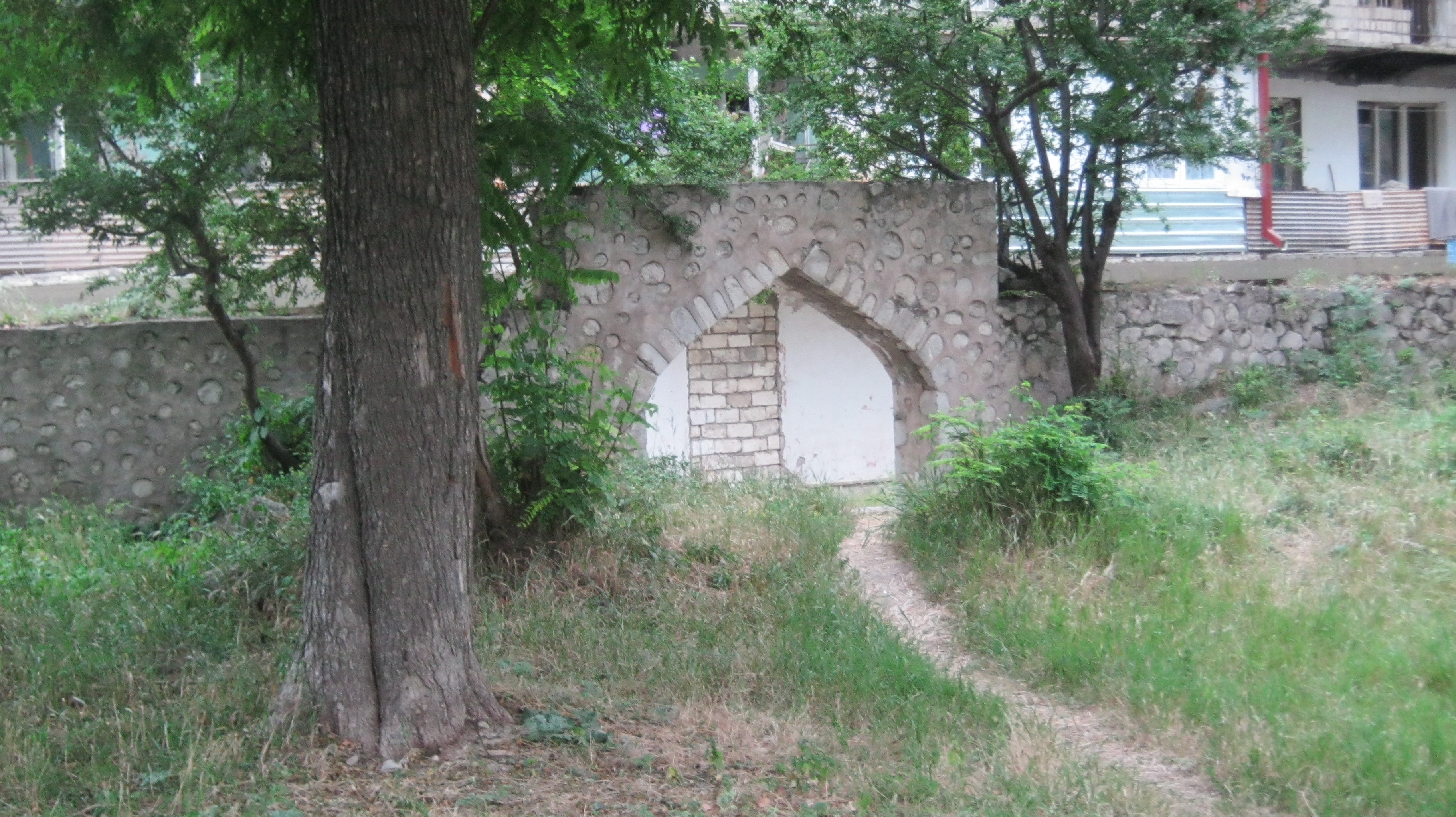 Yuxarı Gövhər ağa məscidi. Şuşa şəhəri, Azərbaycan